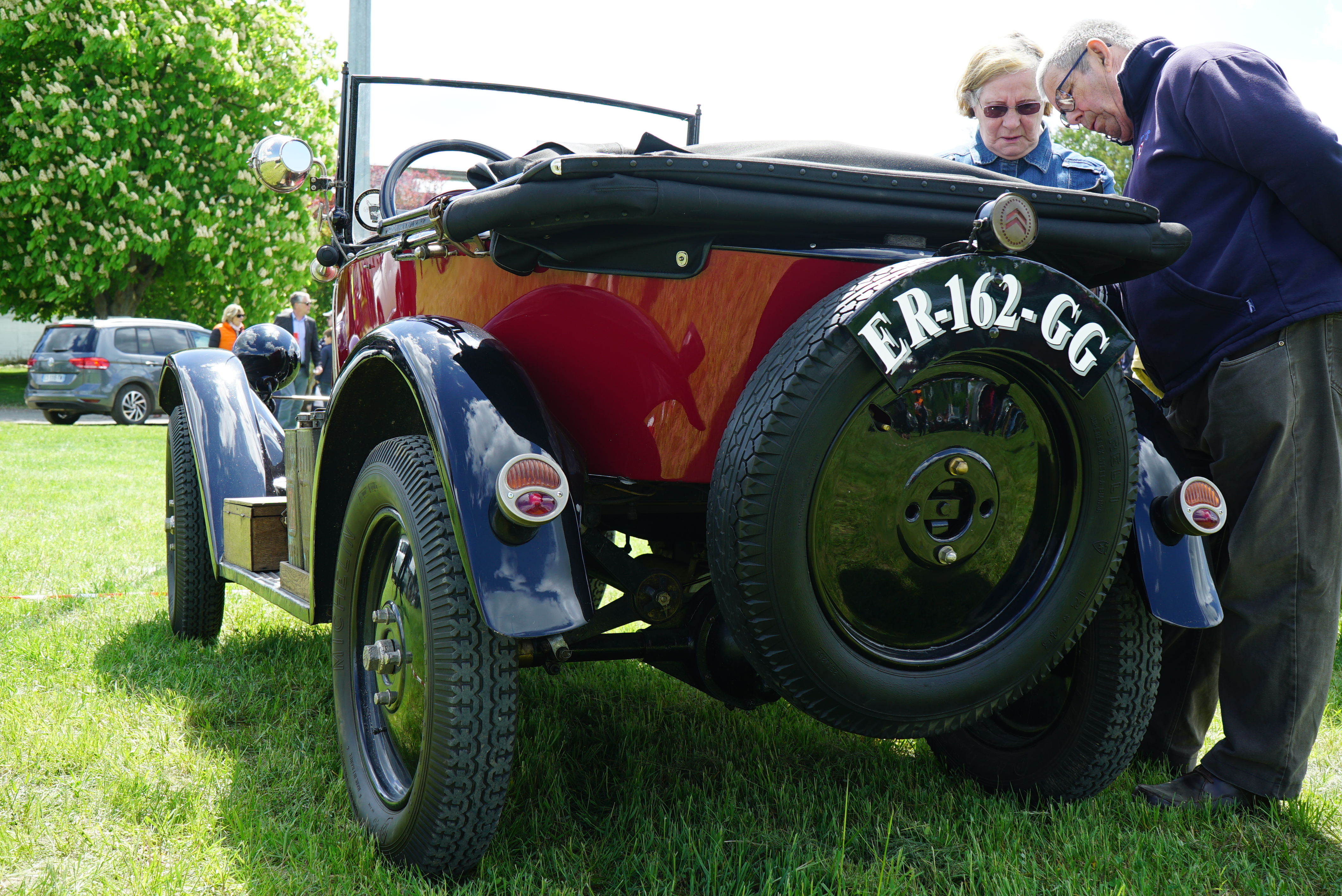 lors de la Course Paris-Amsterdam, 2018 sur le circuit de Gueux.